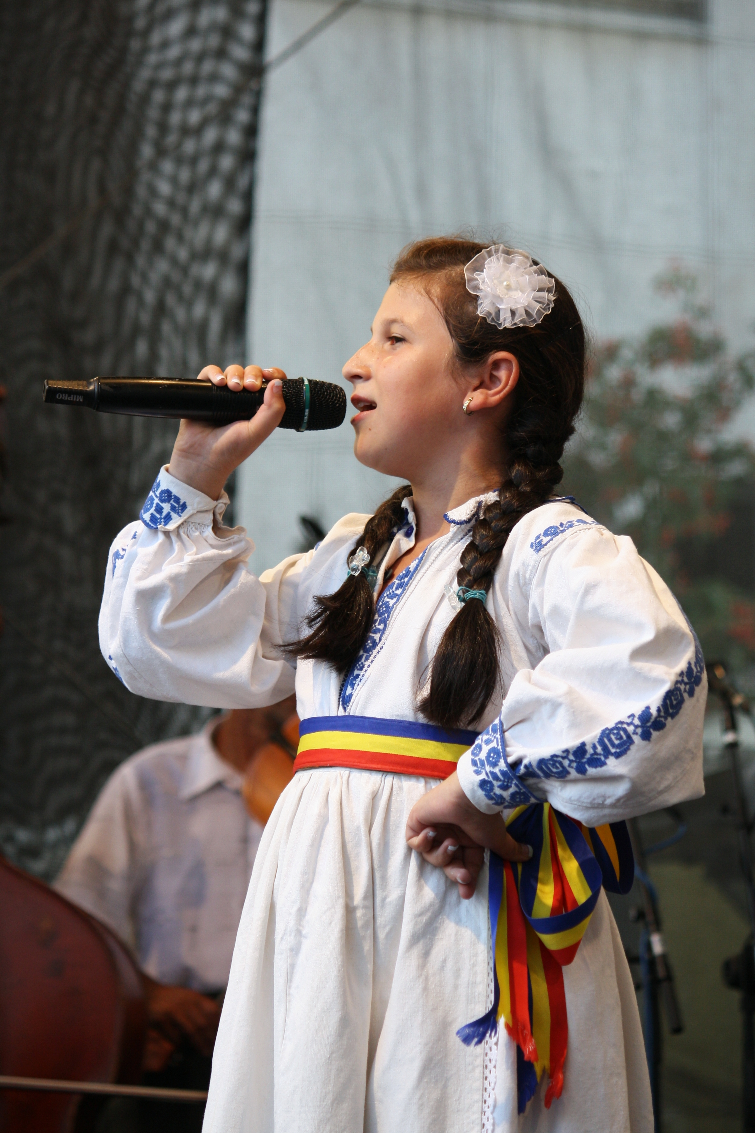 Pražský jarmark 2011 - z vystoupení rumunské folklórní skupiny Doina Somesana